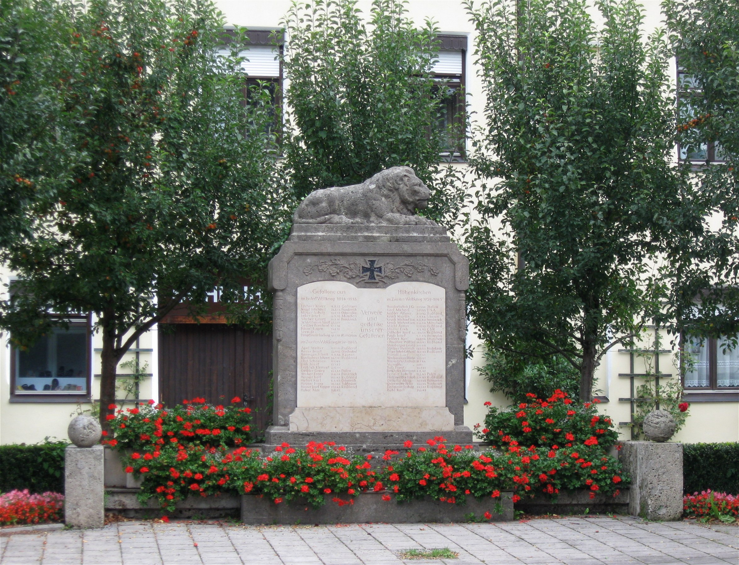 vor Rosenheimer Str. 11, Höhenkirchen; Kriegerdenkmal, Breiter Epitaph auf Postament mit darauf liegendem Löwen, Tuffstein. Bezeichnet mit dem Jahr 1922. D-1-84-127-6